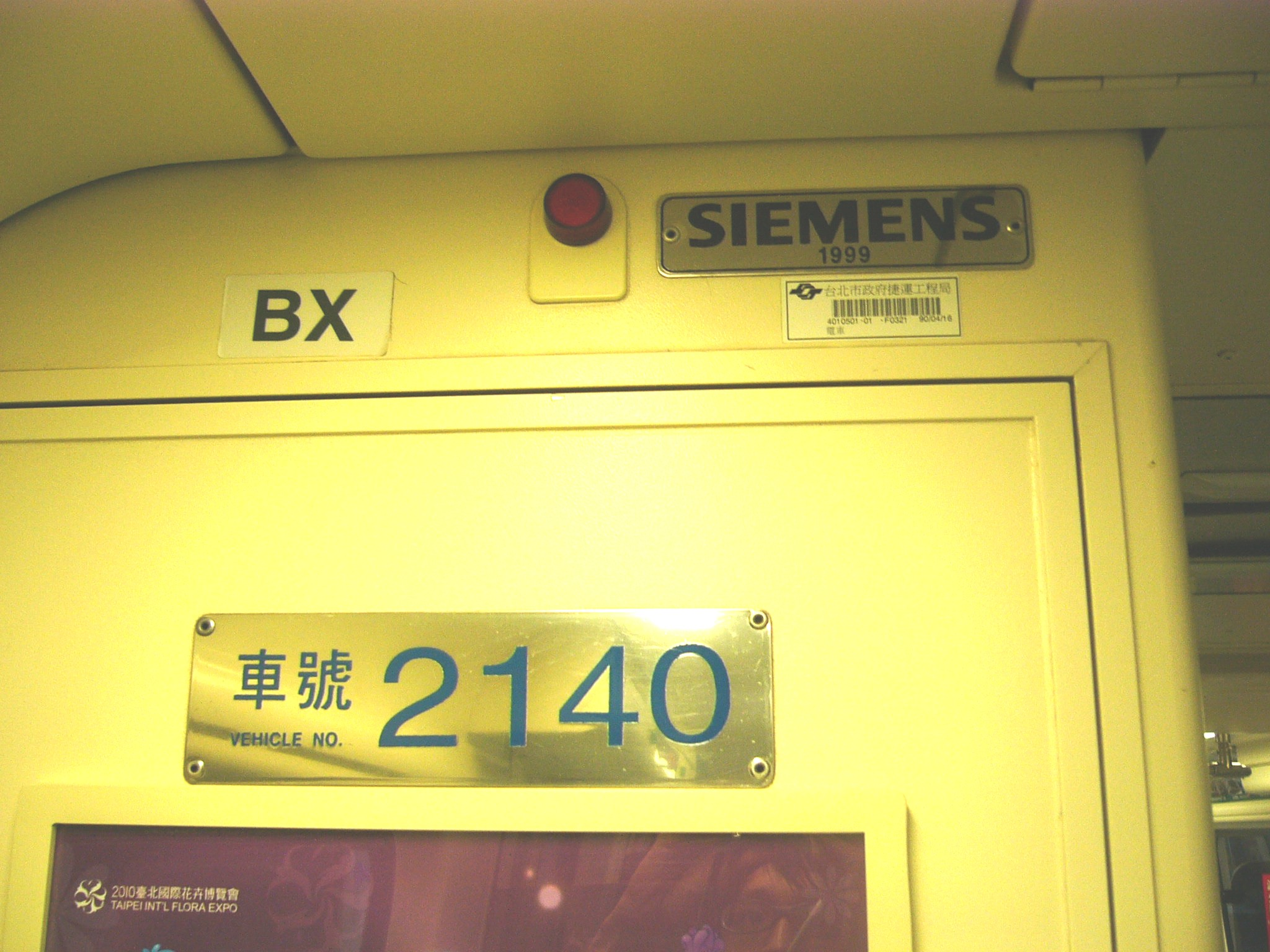 台北捷運321型電聯車內的西門子銘板（右上）與車號銘板（左下）。